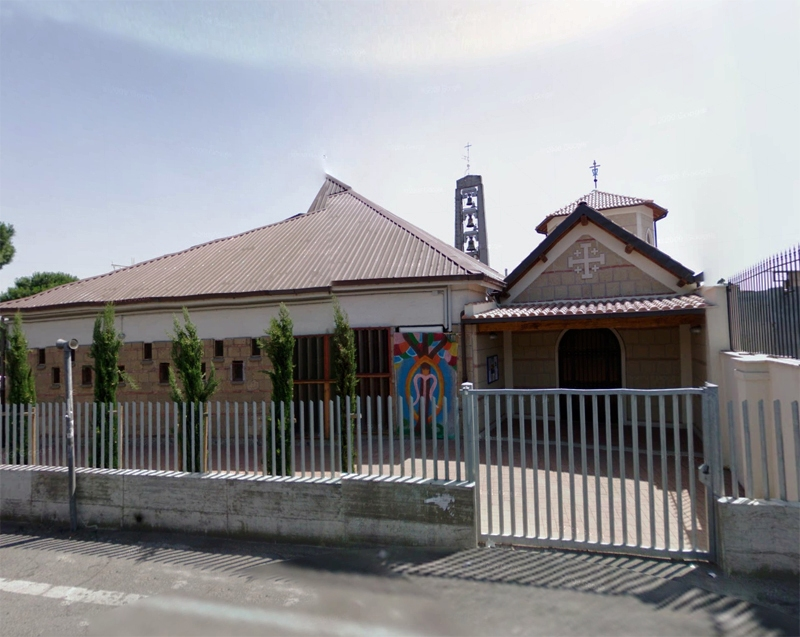 Eglise de la Résurrection de Notre-Seigneur Jésus-Christ (Rome - Torrenova)